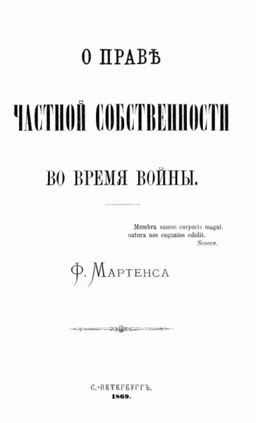 Titelseite der Veröffentlichung „О праве частной собственности во время войны“ (deutsch: „Über das Recht des Privateigentums im Krieg“) des russischen Juristen und Diplomaten Friedrich Fromhold Martens.